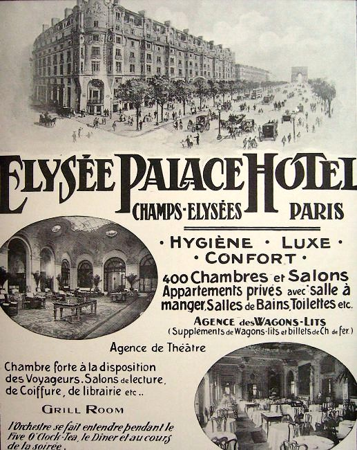 Affichette de publicité pour l'Élysée-Palace Hôtel, avenue des Champs-Élysées (Paris, 8e arrond.).